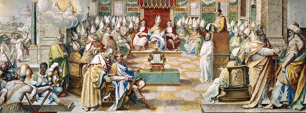 Ouverture du Concile de Nicée (325) par l'Empereur Constantin Ier le Grand (premier plan).